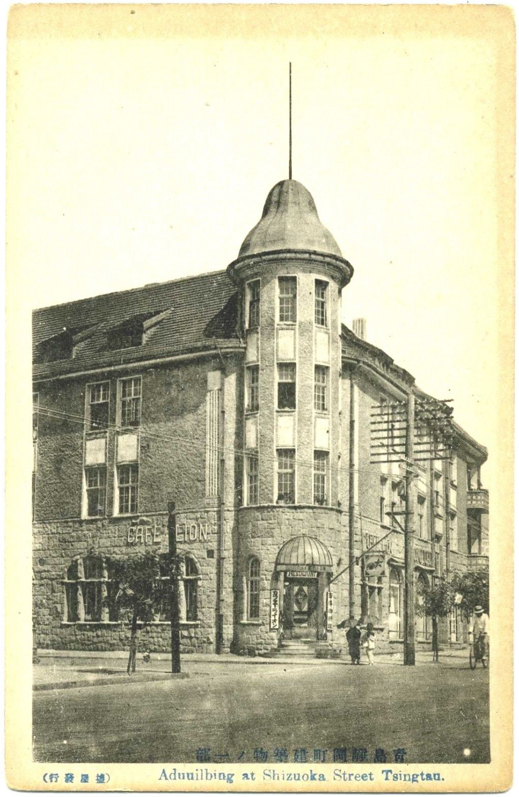 青岛奥托商业楼旧址